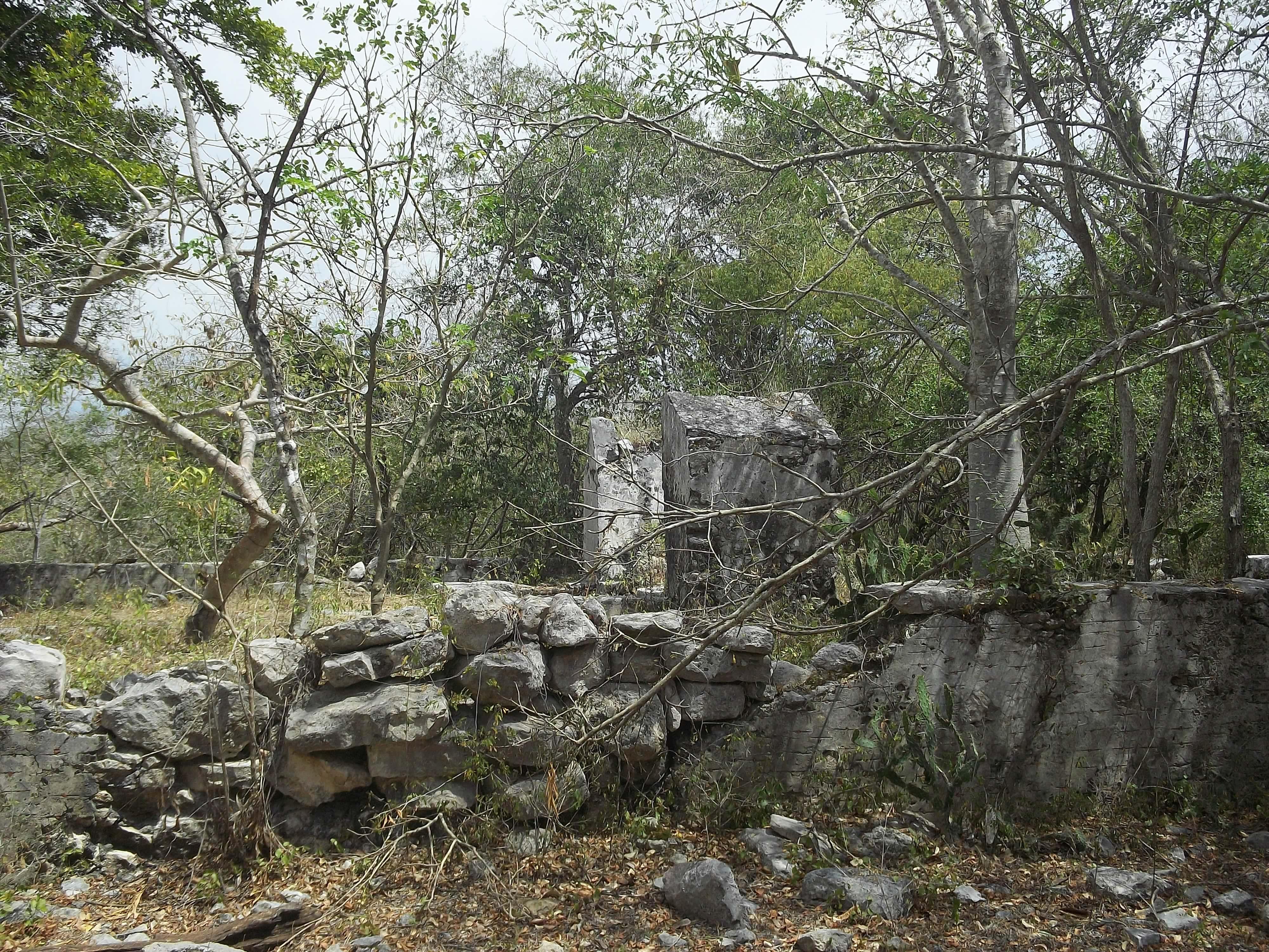 Exrancho de Sabakalal, Yucatán.